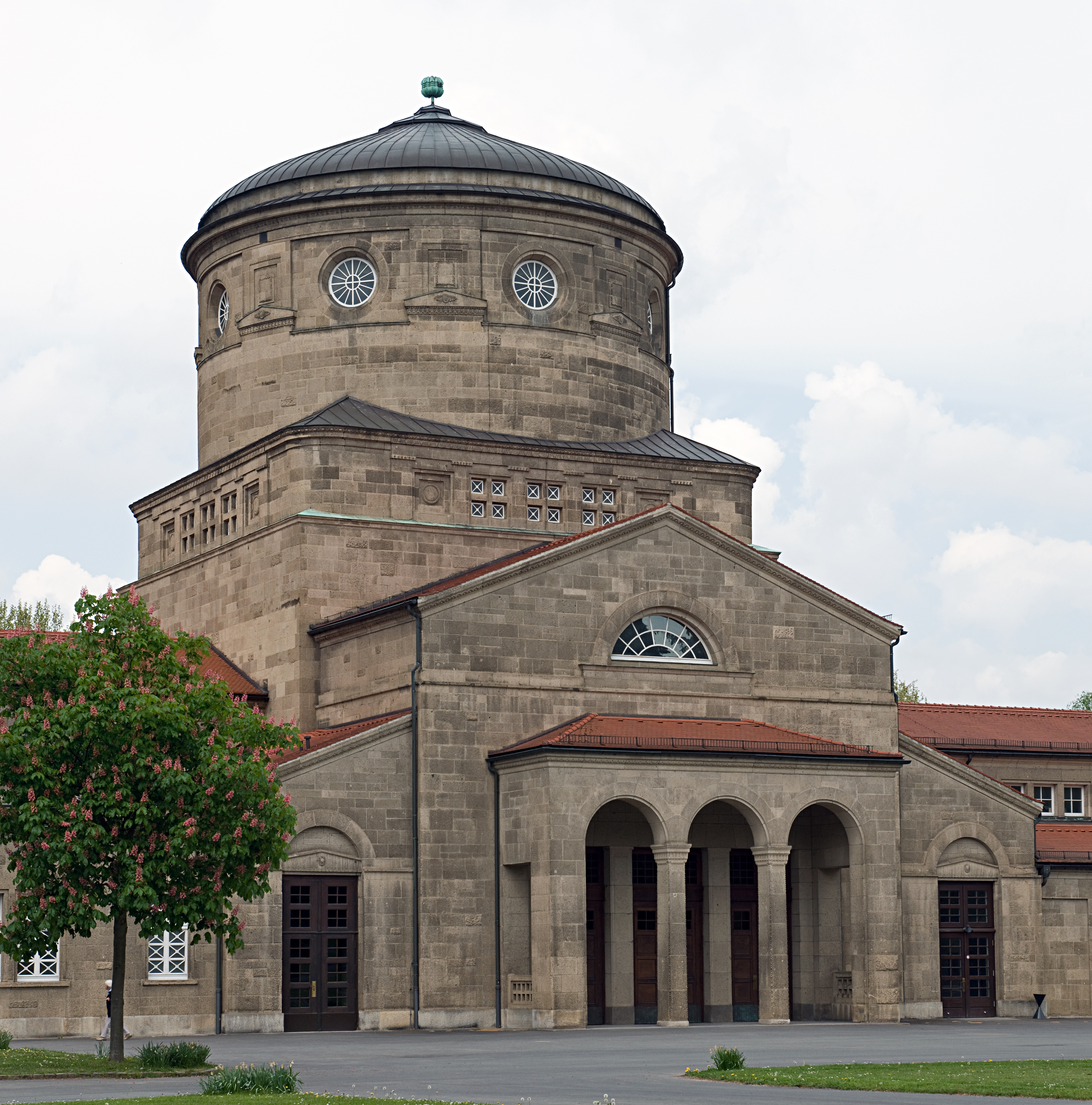 Haupthalle des Hauptfriedhofes Frankfurt am Main